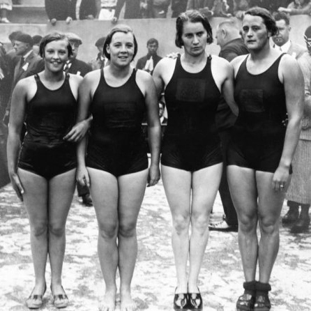 Zwemmen: de winnende Nederlandse estafetteploeg in Parijs. Met, tweede van links: de Rotterdamse zwemster Marie Braun (1911-1982), ook wel "Zus Braun" genoemd. 1931.